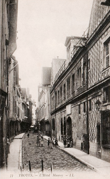 Troyes, Hôtel de Mauroy et rue de la Trinité, carte postale ancienne, vers 1910.